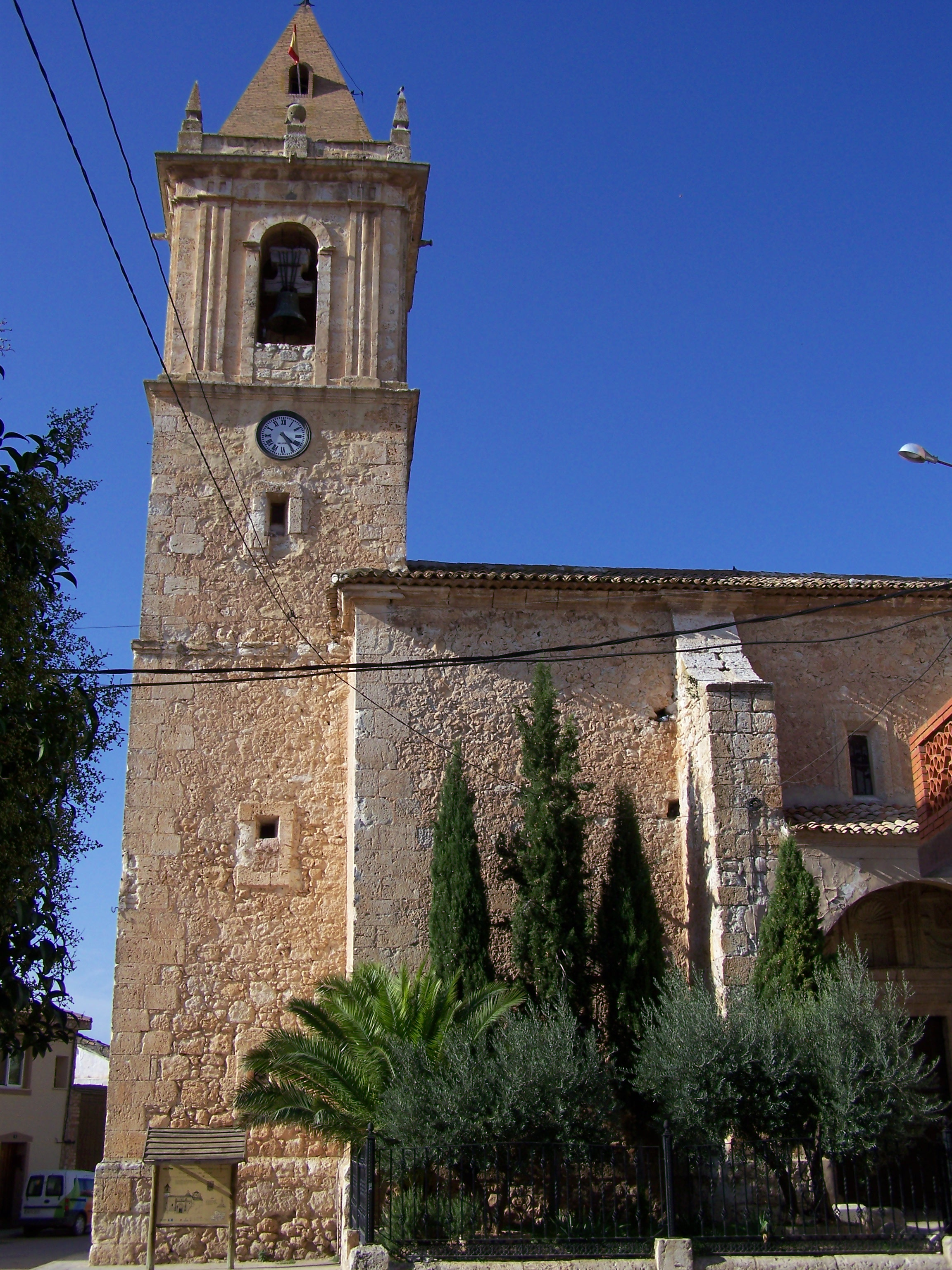 Iglesia de Santa Quiteria (frontal), Casas de Ves, Albacete